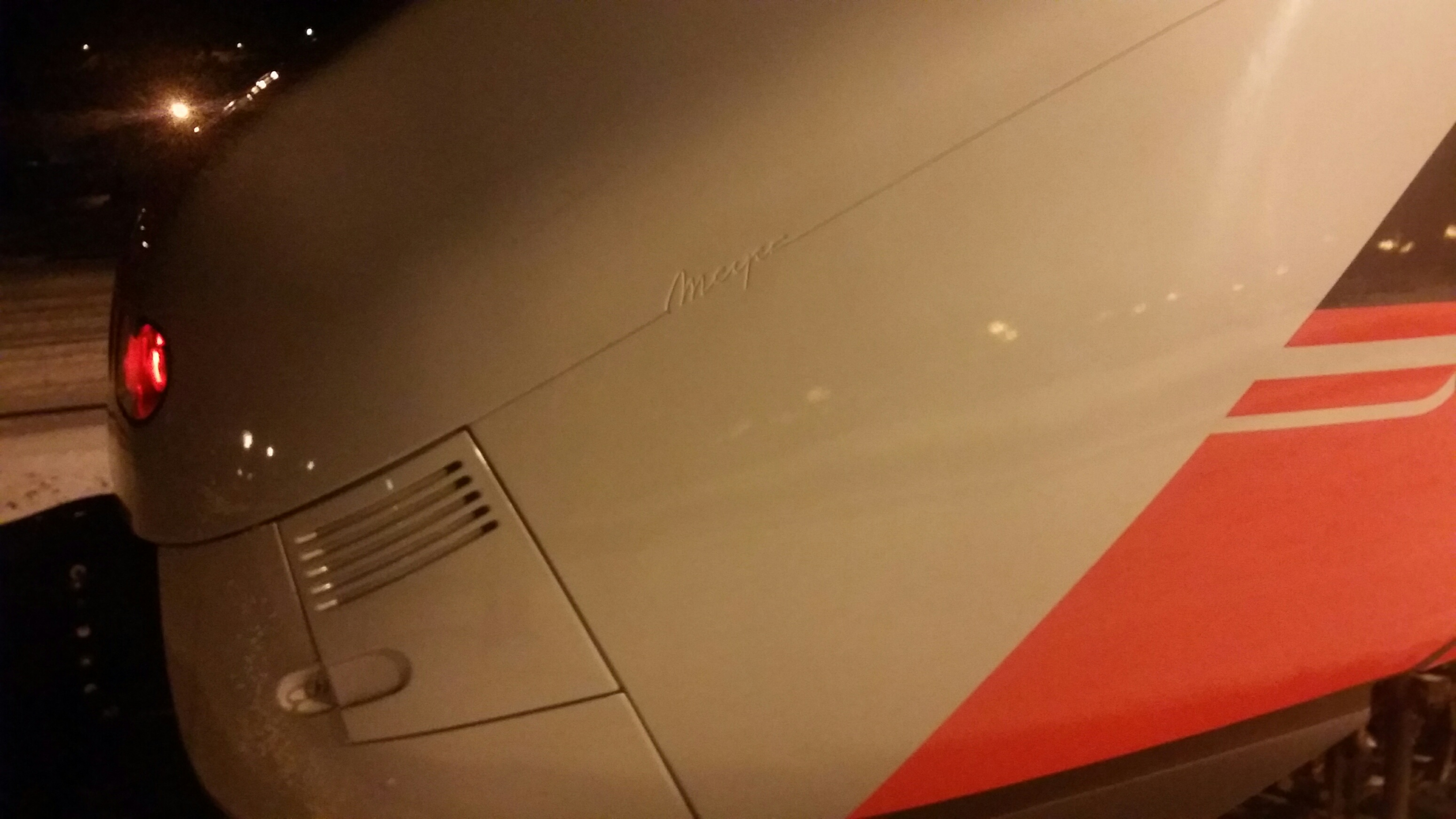 Meyers signatyr er støpt inn i fronten på togtypene 71 og 73.